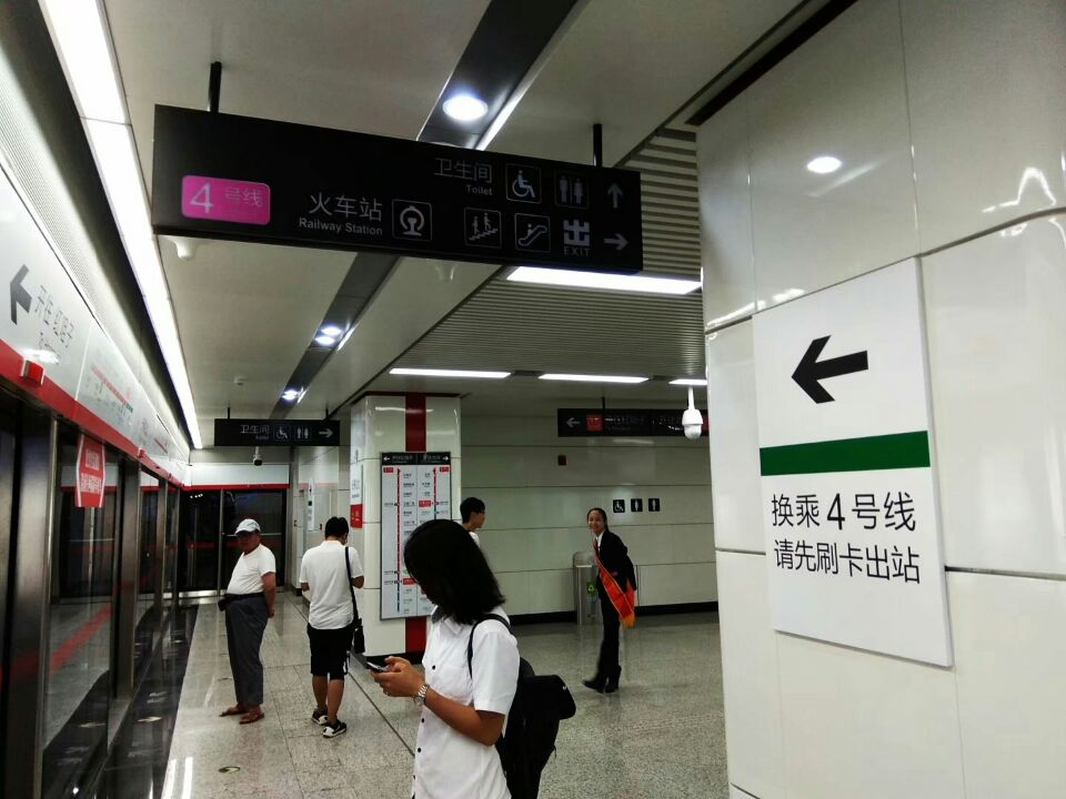 长春地铁一号线长春站北站台